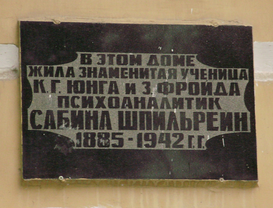 Памятная доска в Ростове-на-Дону - Сабрина Шпильрейн